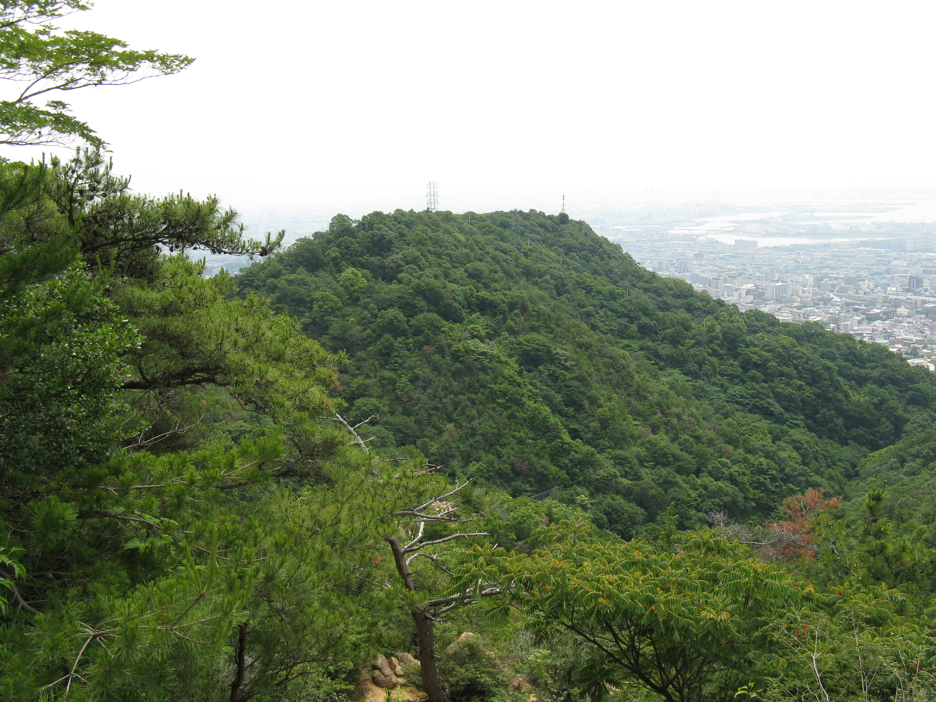 鷹尾山(風吹岩より撮影）